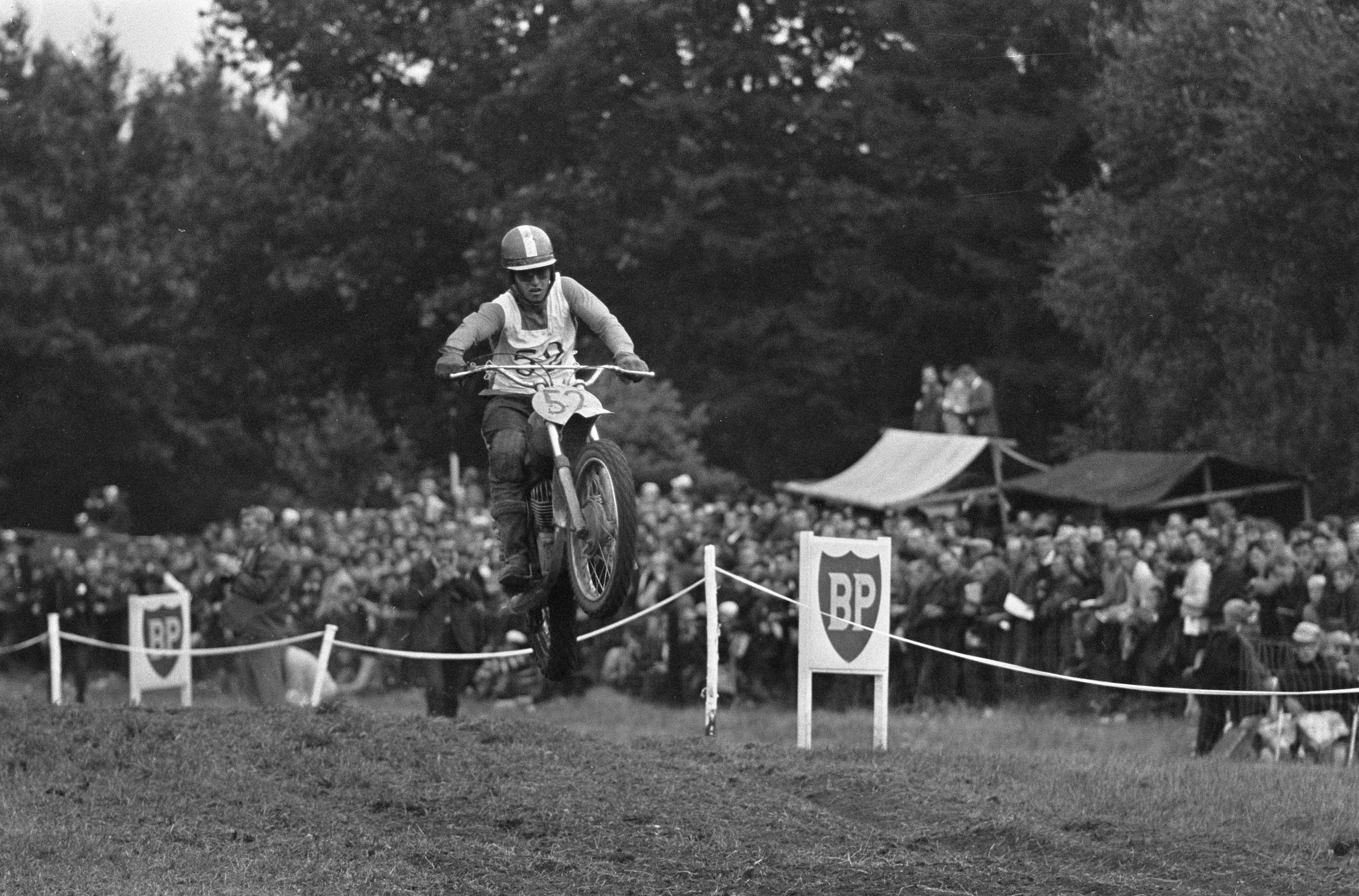 Collectie / Archief : Fotocollectie Anefo Reportage / Serie : [ onbekend ] Beschrijving : Motorcross Des Nations 1967 te Markelo. Renners in aktie Datum : 3 september 1967 Locatie : Markelo Trefwoorden : Motorcross Fotograaf : Koch, Eric / Anefo Auteursrechthebbende : Nationaal Archief Materiaalsoort : Negatief (zwart/wit) Nummer archiefinventaris : bekijk toegang 2.24.01.05 Bestanddeelnummer : 920-6734 Reacties Geplaatst door wieb van de pol op 26 mei 2011 - 20:39. 52 is Pierre Karsmakers